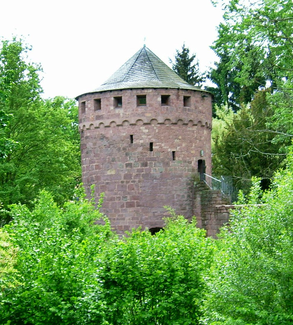 Burgturm in